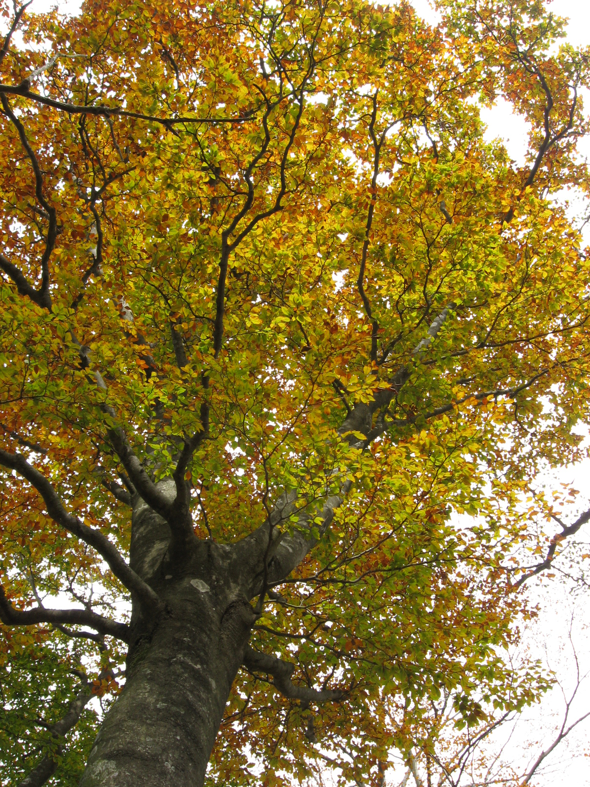 イヌブナの黄葉 Fagus crenata